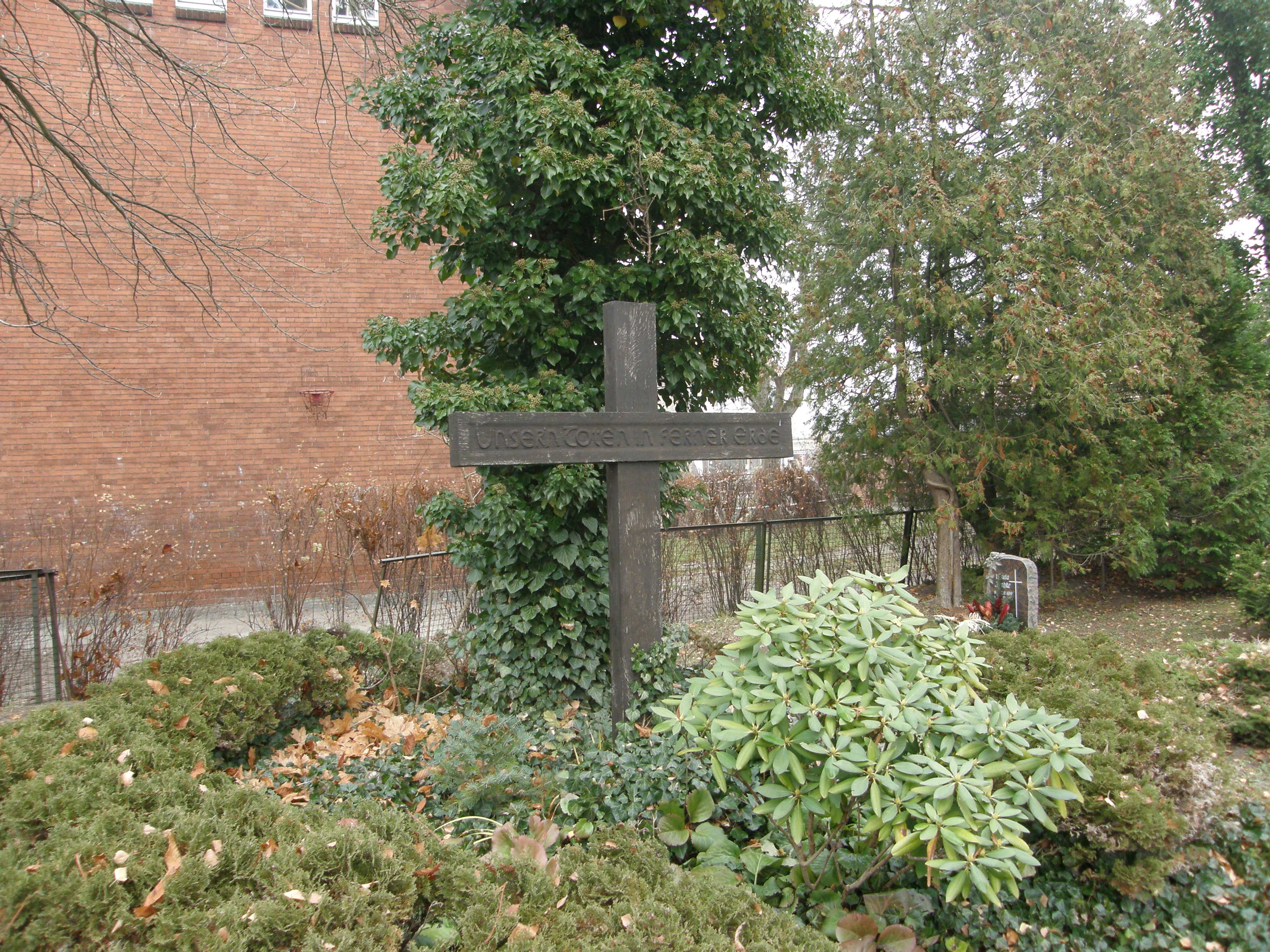 Falkenhagener Dorfkirche, Eisernes Ehrenkreuz auf dem Kirchhof